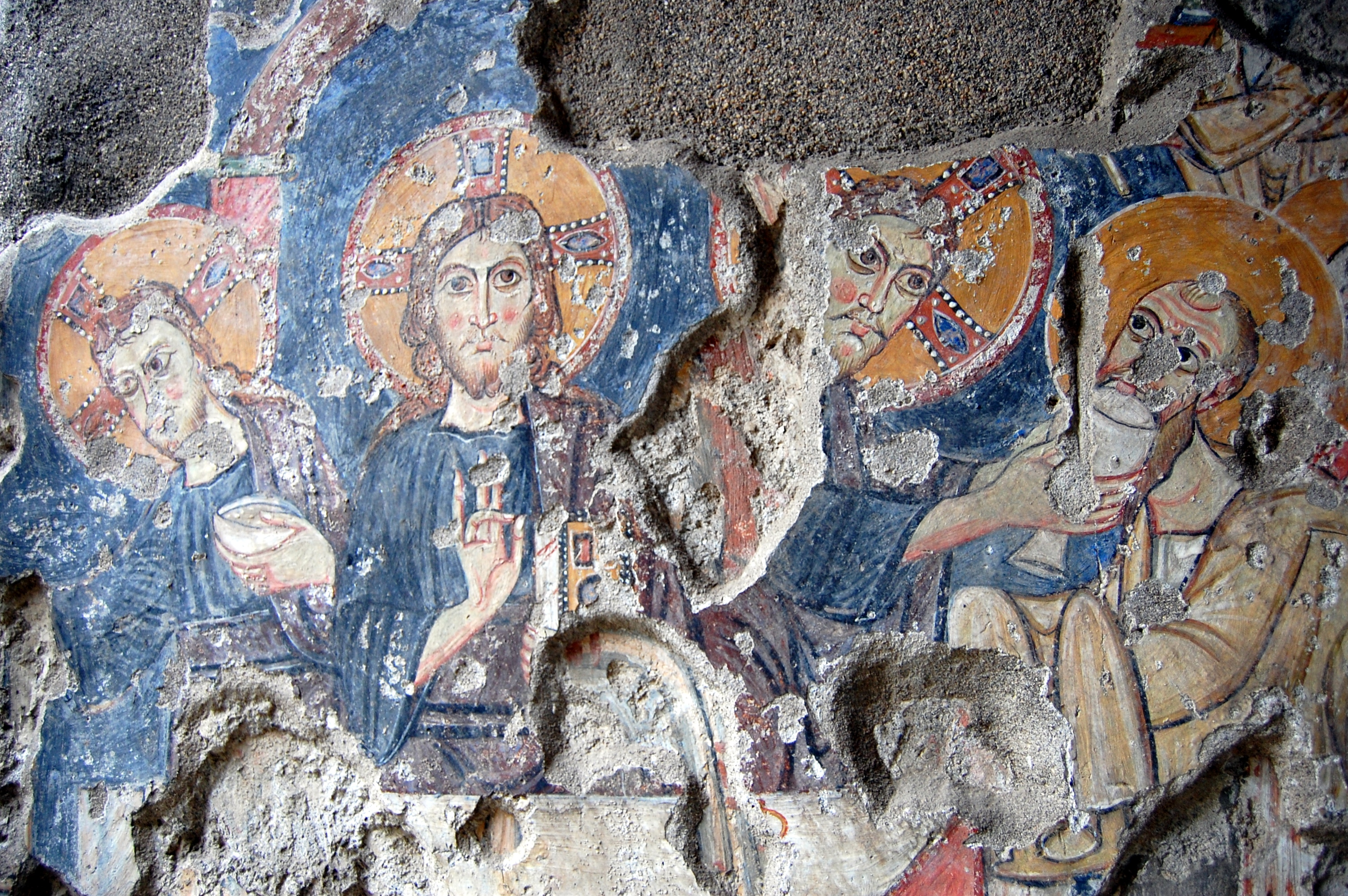 Affresco eucarestia Cimitile